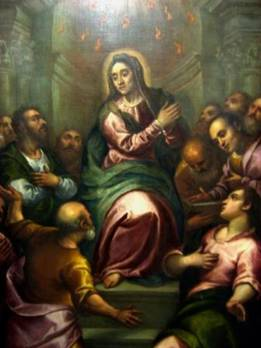 Tizianello - Discesa dello Spirito Santo pala d'altare Chiesa di San Nicola - Bojon di Campolongo Maggiore (VE)